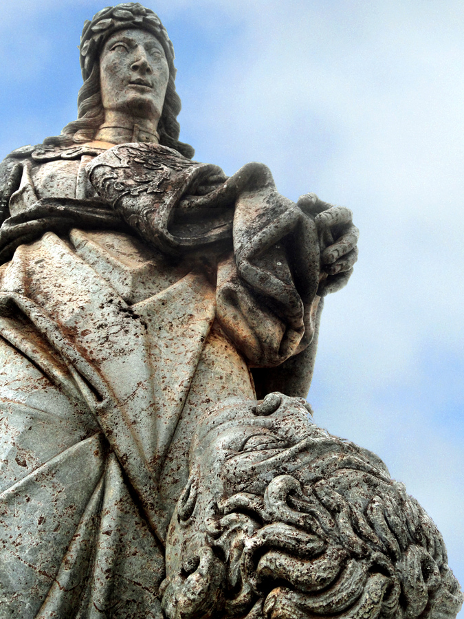 Profeta Daniel, de Aleijadinho, adro do Santuário de Congonhas